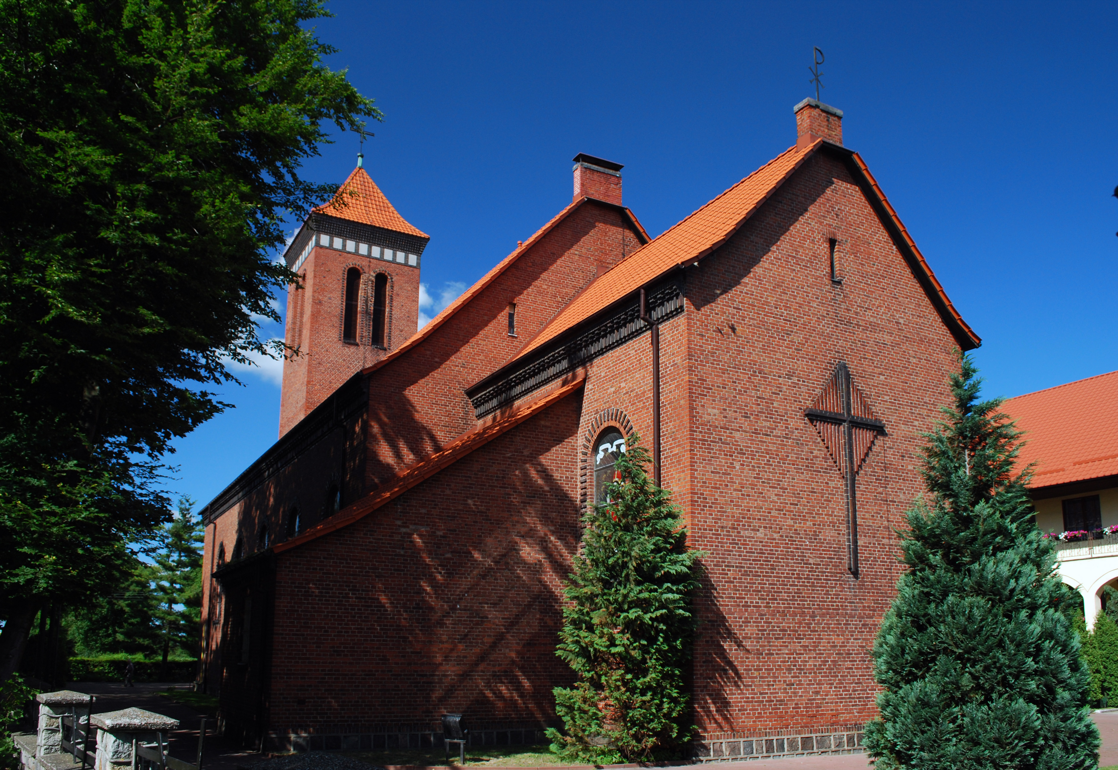 Kościół w Pszczółkach